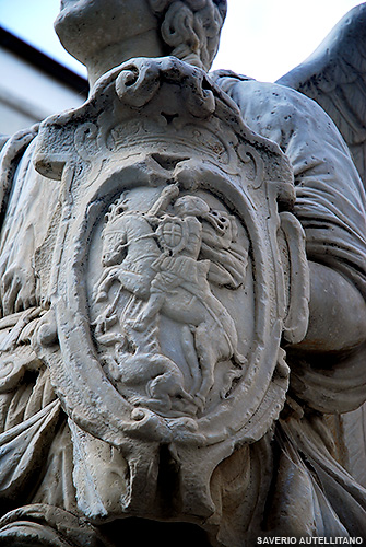 Reggio Calabria, scudo di San Giorgio della statua dell'Angelo Tutelare a Piazza S.Giorgio sul Corso Garibaldi Foto concessa dall'Autore - Saverio Autellitano, - purché se ne citi e se ne riconosca la paternità anche su opere derivate.